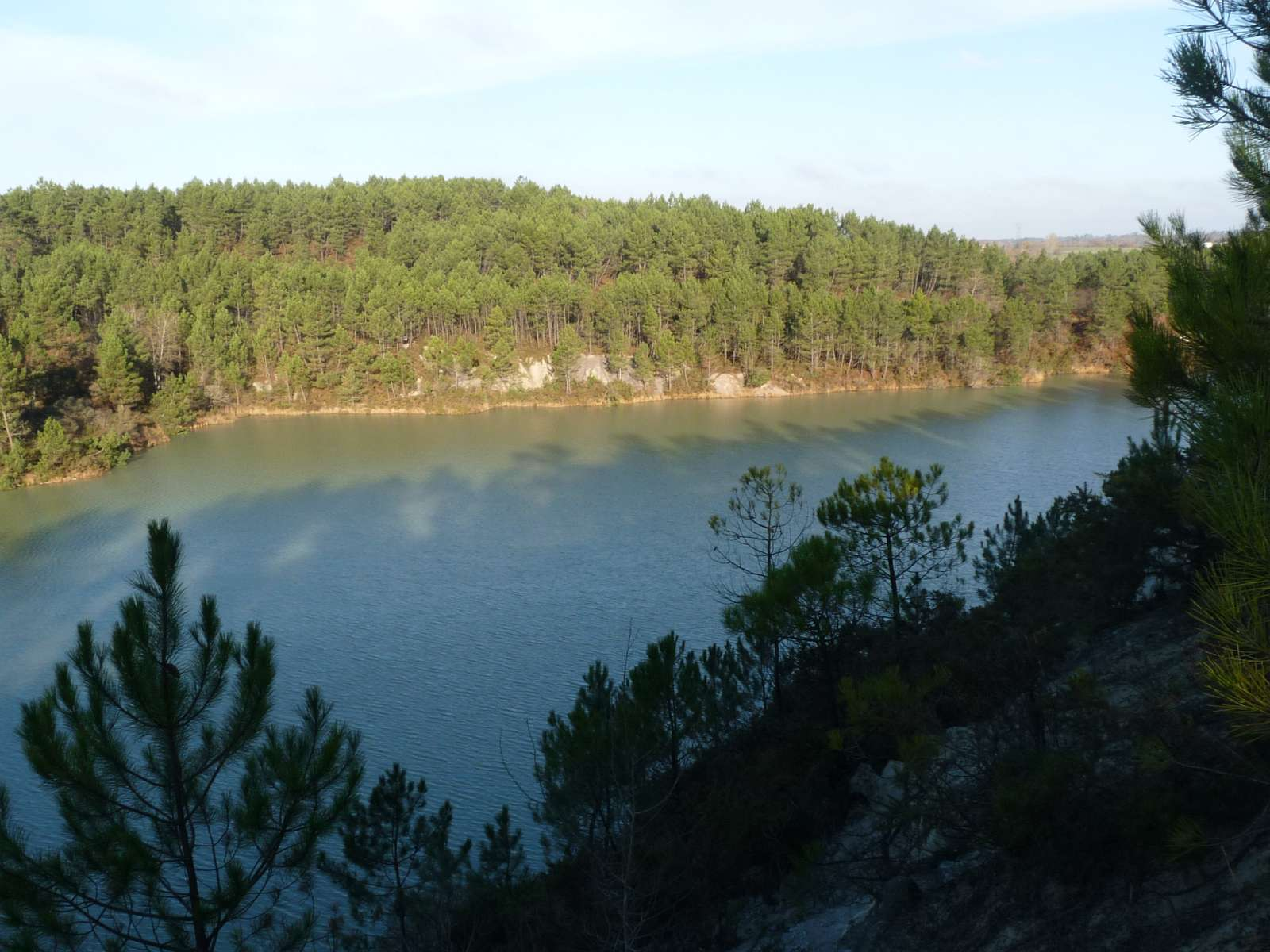 anciennes carrières des landes de Touvérac, Charente, France